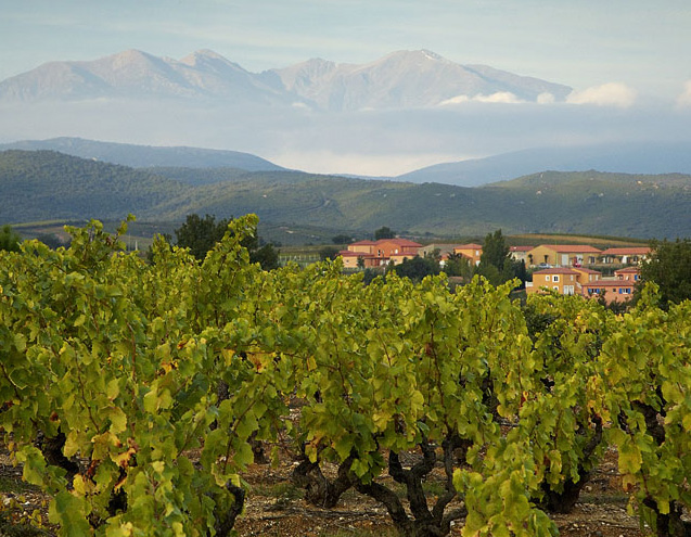 Vinyard nr Perpignan, Languedoc region, France 2006